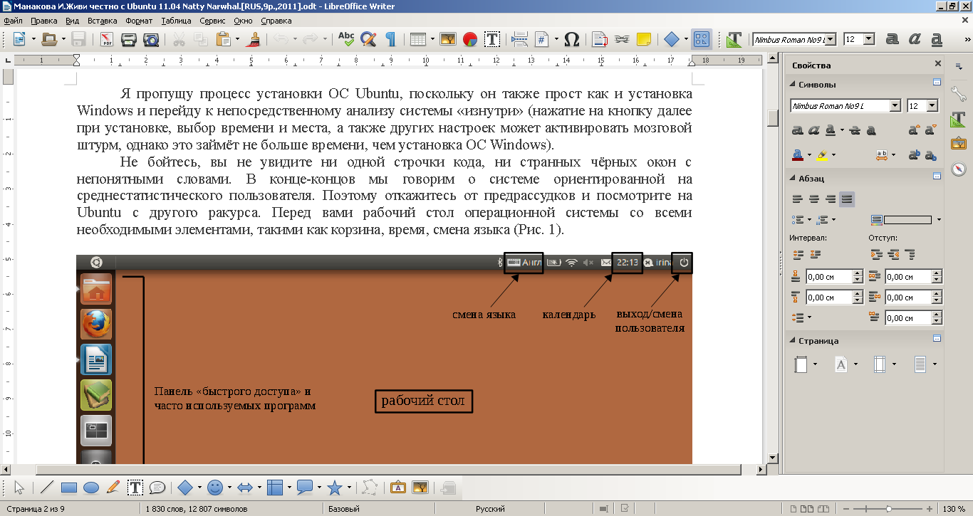 LibreOffice 4.4.5.2 Writer в ОС Windows 7